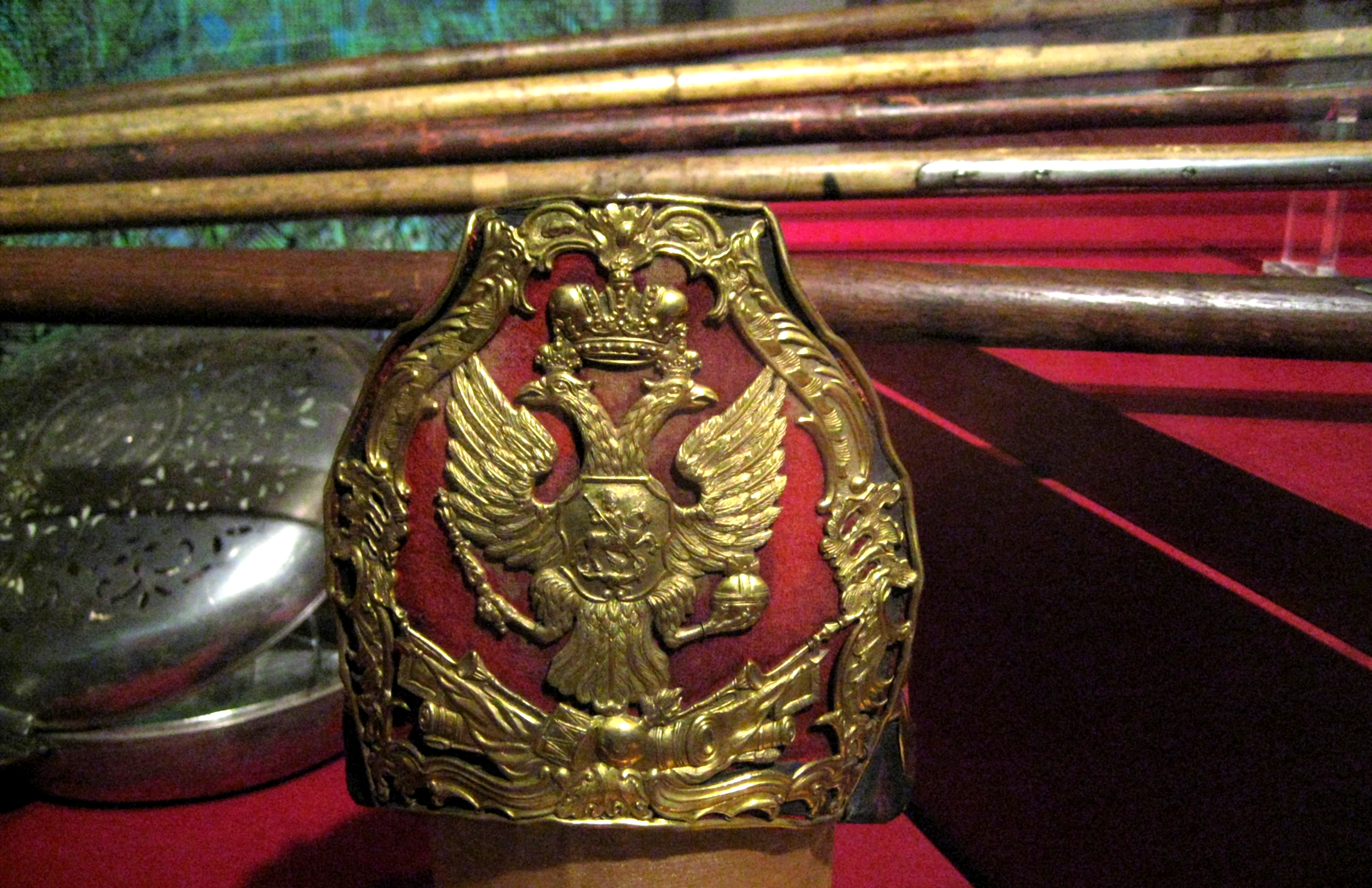 Шапка гренадерская рядового Лейб-Кампании. 1740-1760-е. ГИМ